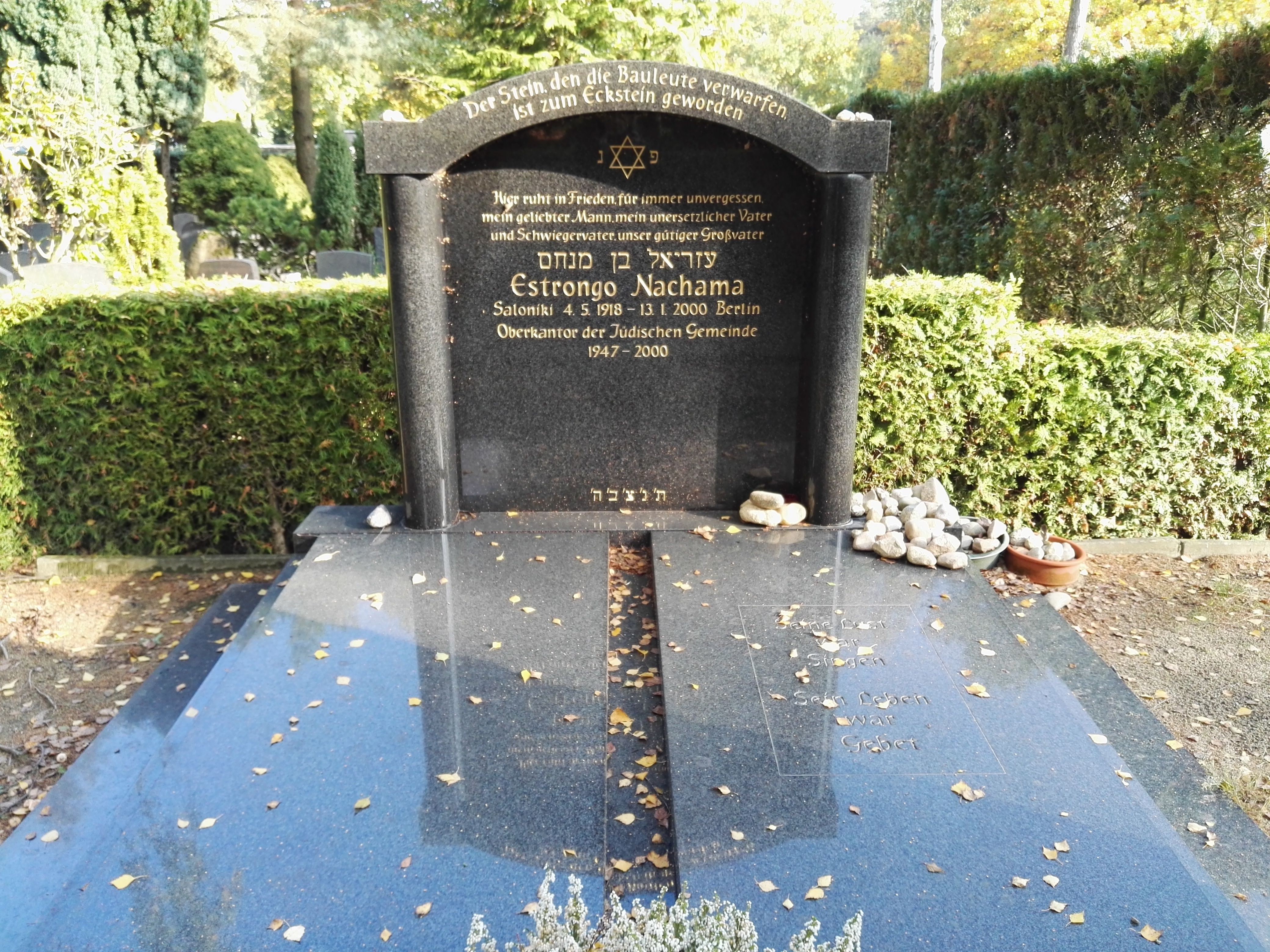 Grab von Estrongo Nachama auf dem Jüdischer Friedhof Heerstraße